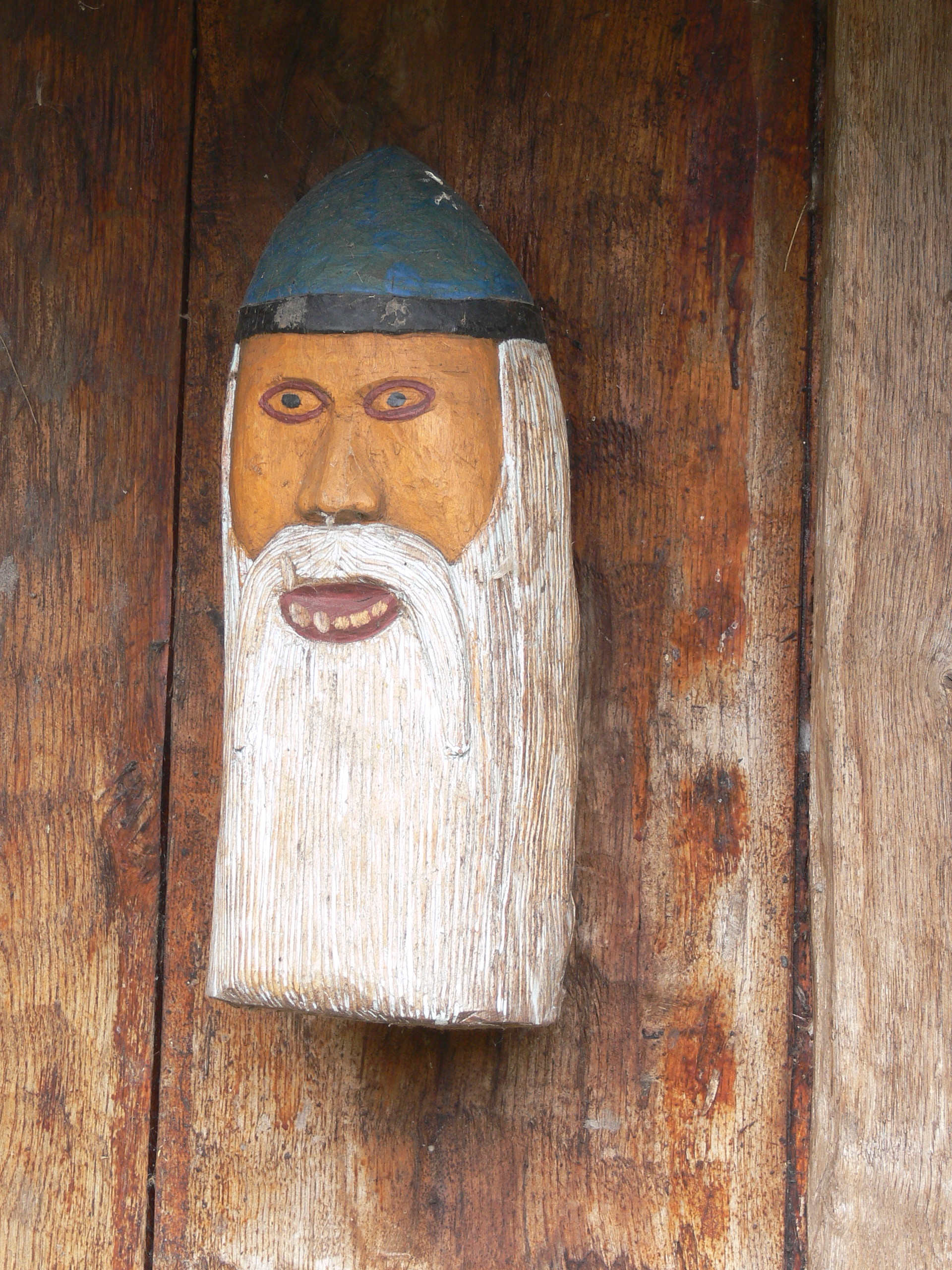 Wikinger Museum Foteviken in Skanör. Gott Ägir.